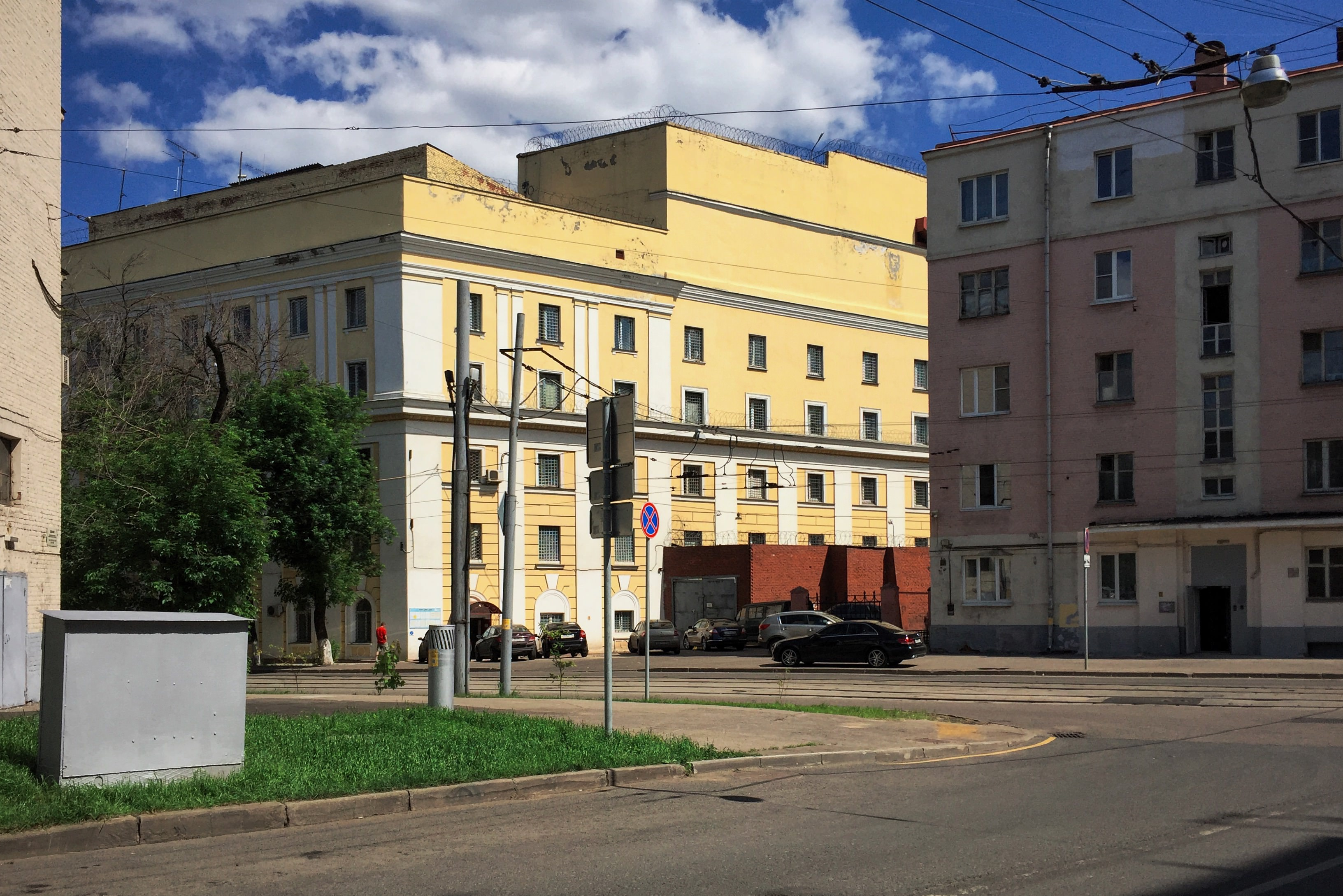 Угол Стромынского переулка и улицы Матросская Тишина. Жёлтое здание — тюрьма Матросская Тишина.